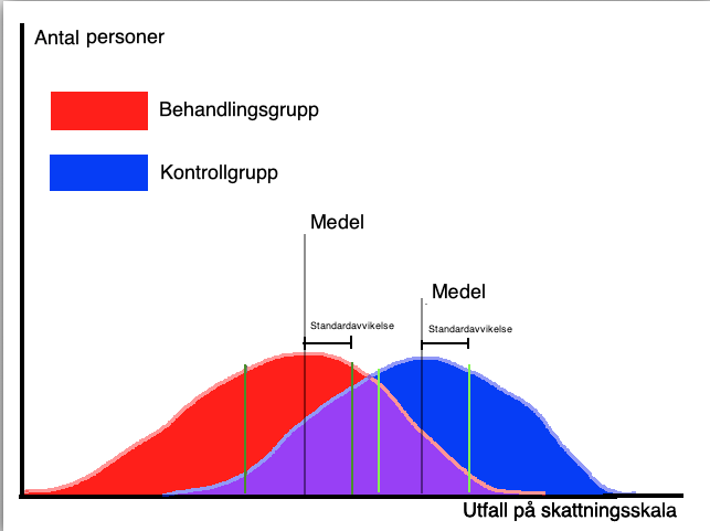 Normalfördelningar för respektive grupp.